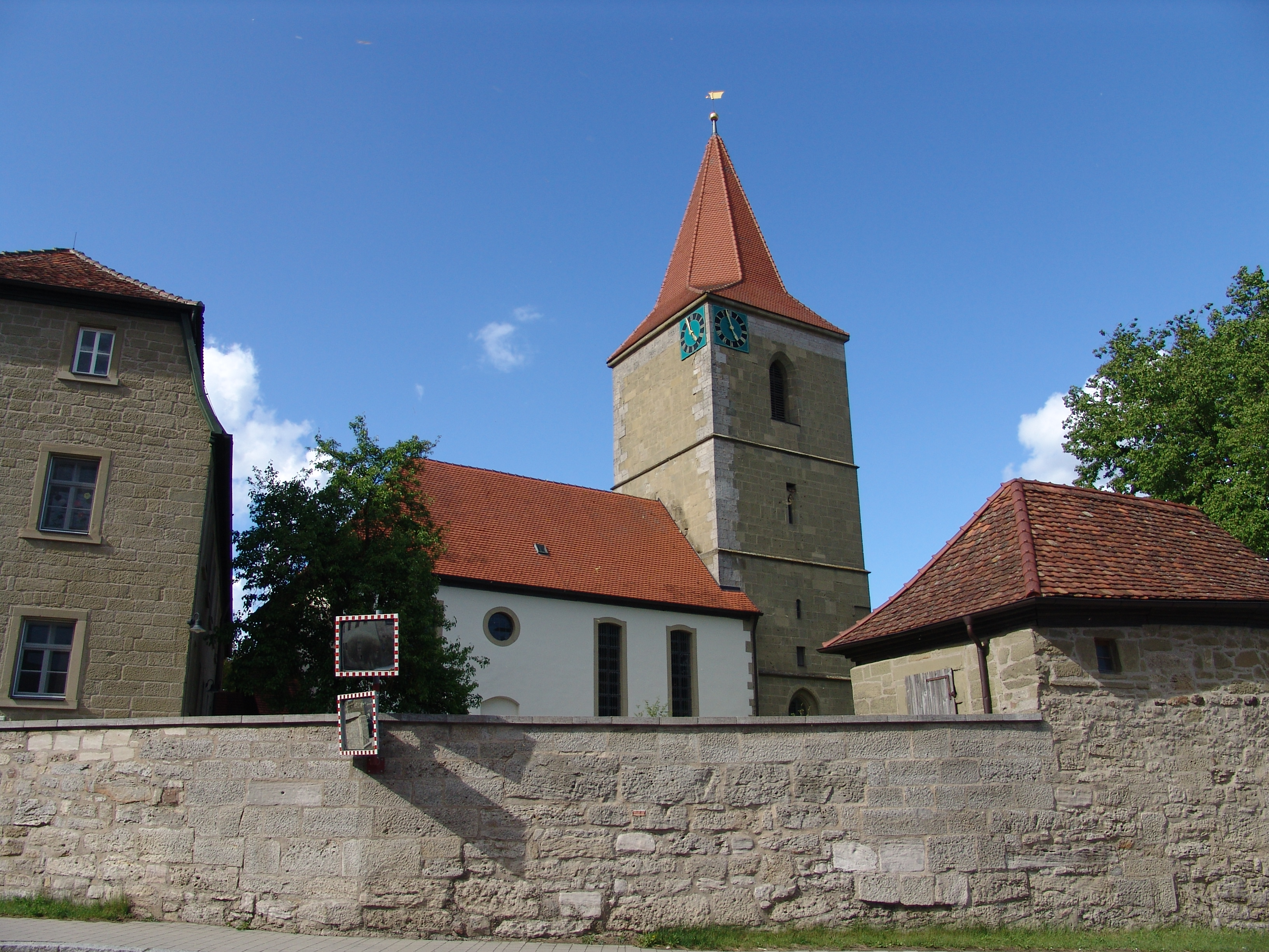 evang-luth. Kirche St. Ulrich und Sebastian in Insingen